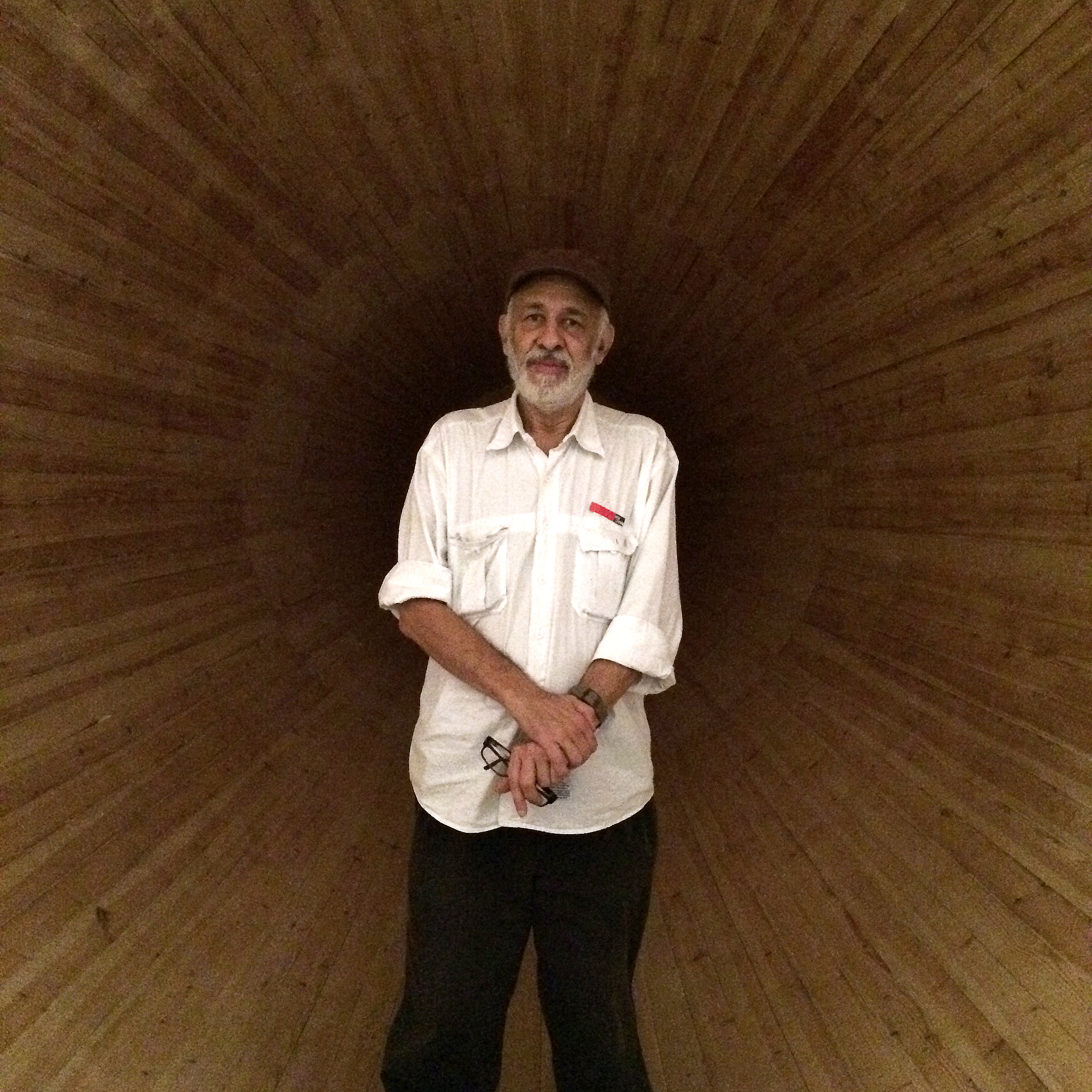 L’artista brasiler sempre ha mostrat un gran interès per incloure l’espectador a l’interior de les seves obres per tal que visquin experiències sensorials; tàctils, sonores, olfactives o gustatives. ‘Entrevendo’ n’és un exemple: es tracta d’una obra de grans dimensions, construïda a partir de llistons i anelles de fusta, que convida l’espectador a entrar-hi. La peça forma part de la nova exposició de la Col·lecció MACBA, que es podrà visitar fins a l’abril del 2017. Foto: Matías Rossi / MACBA, 2016.